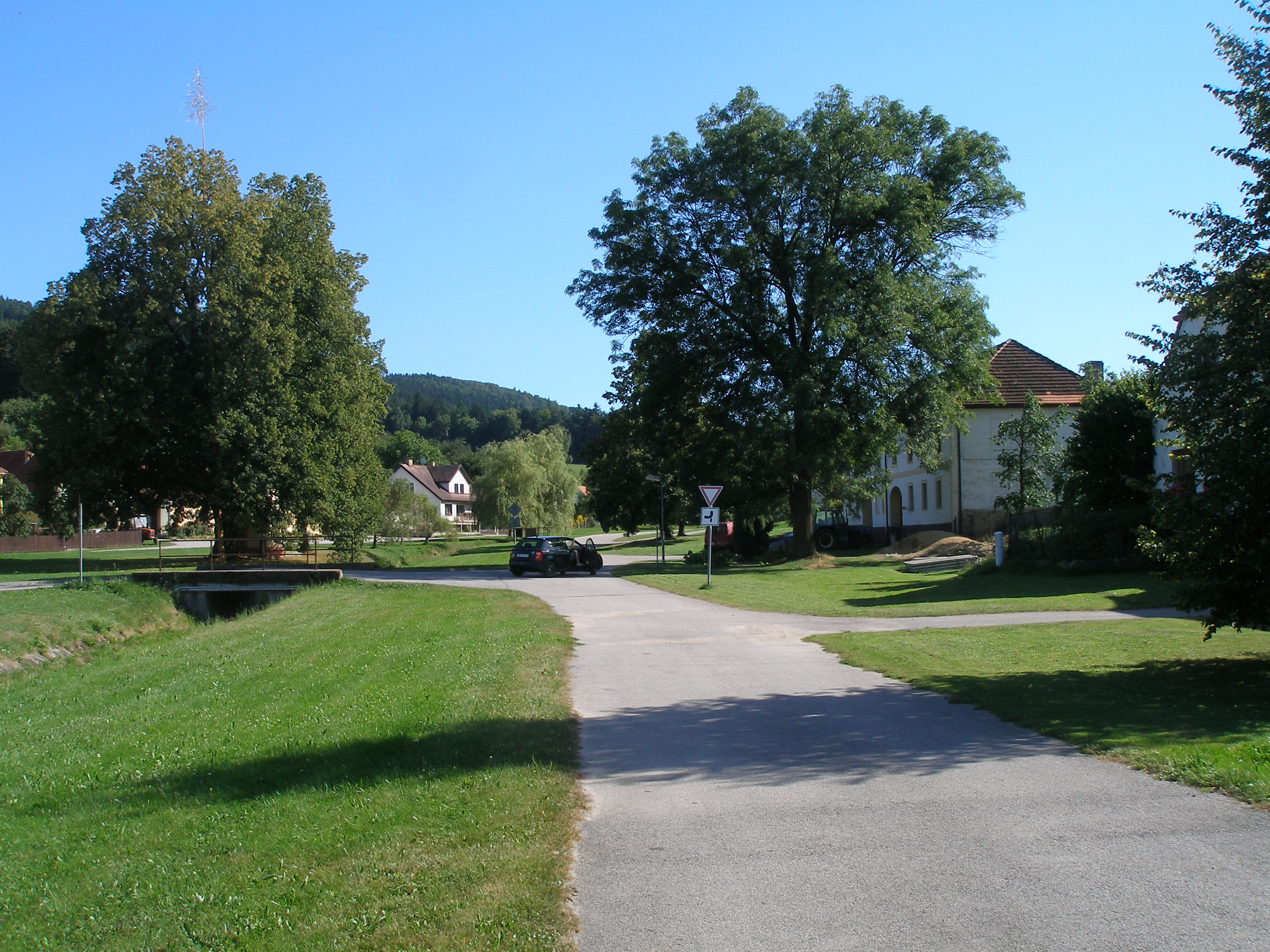 Jáma - stavení na návsi osady